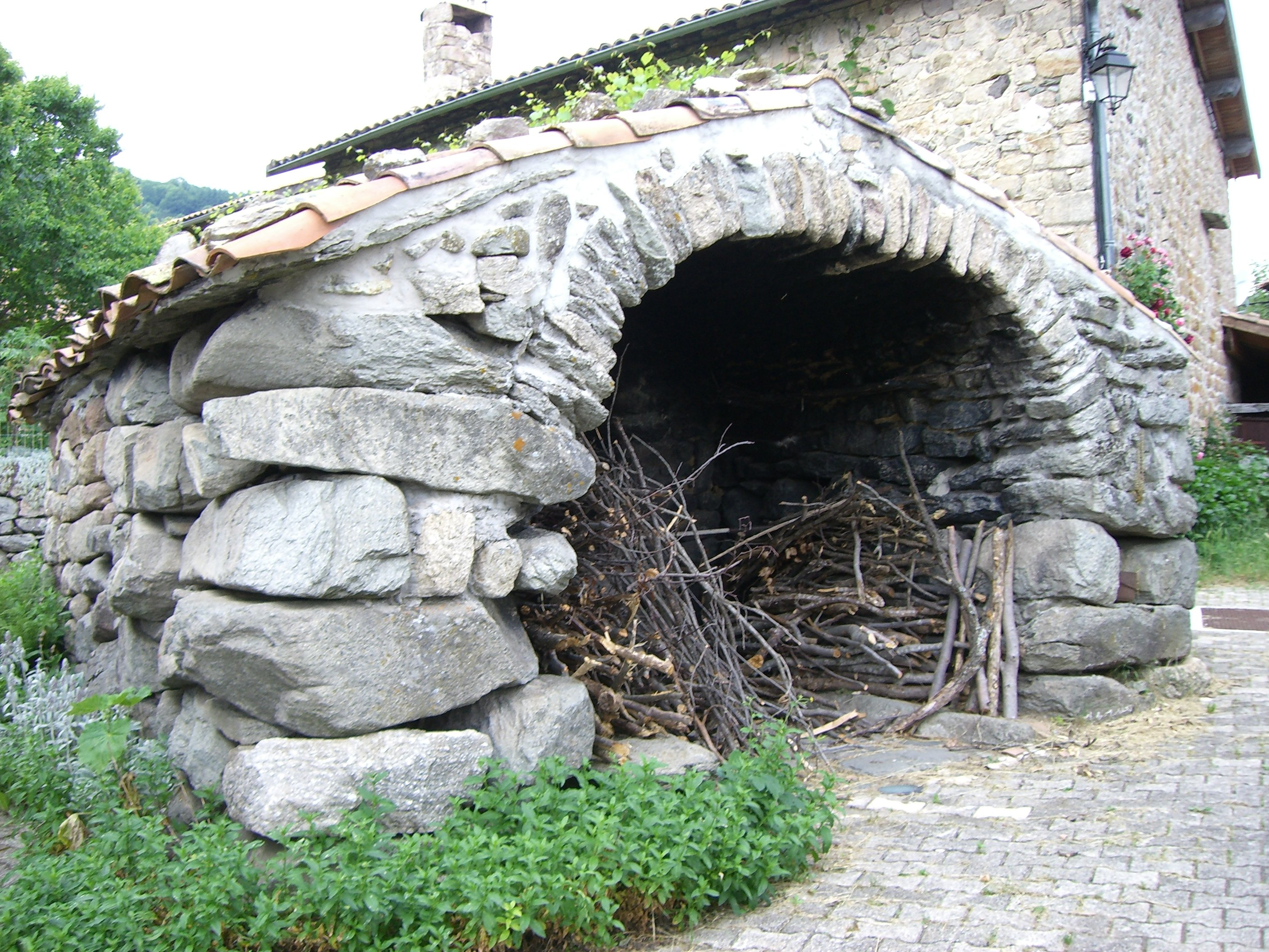 Photographie du four à pain de Girond. Girond est un hameau rattaché à la commune de Mariac.